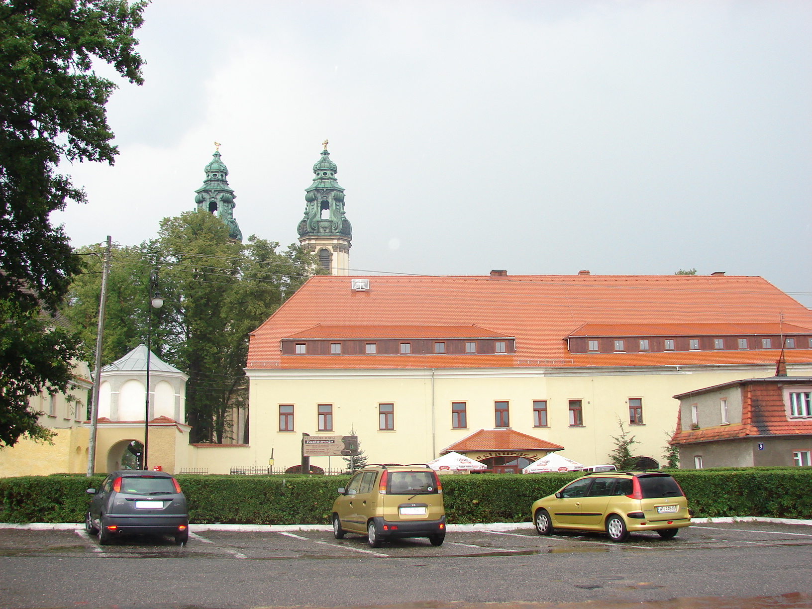 Opactwo cystersów w Krzeszowie